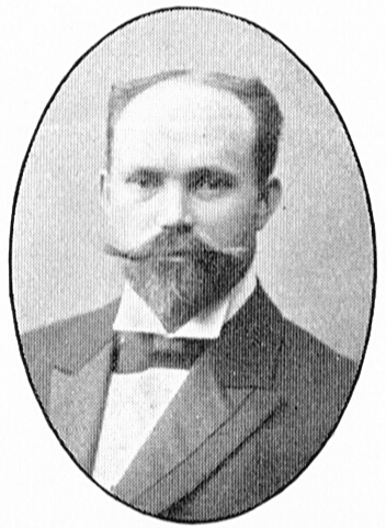 Arkitekten Nils Nordén